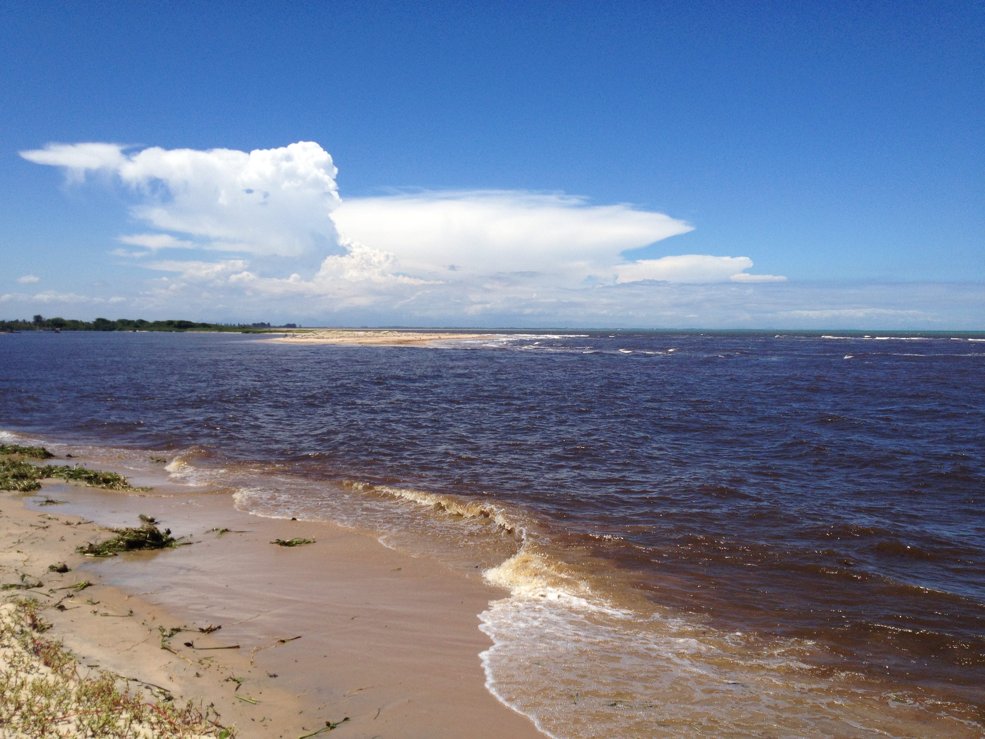 Rio Itabapoana encontra o mar